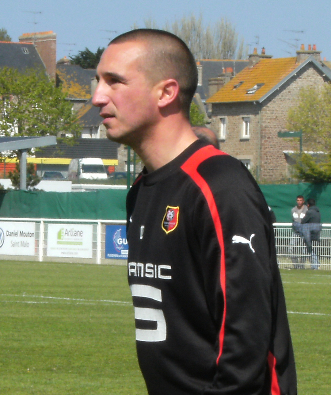 Photo prise lors d'un entraînement du Stade rennais au stade de Marville de Saint-Malo le 3 mai 2013. Photo de Nicolas Dyon